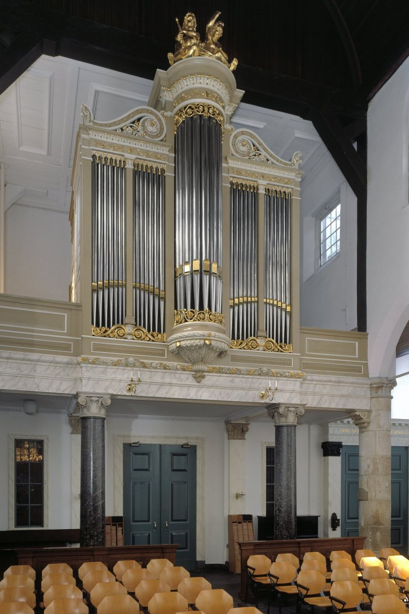 Oude Kerk van Delfshaven: Interieur, aanzicht orgel, orgelnummer 1296 (opmerking: Gefotografeerd voor Het Historische Orgel in Nederland 1850-1858)